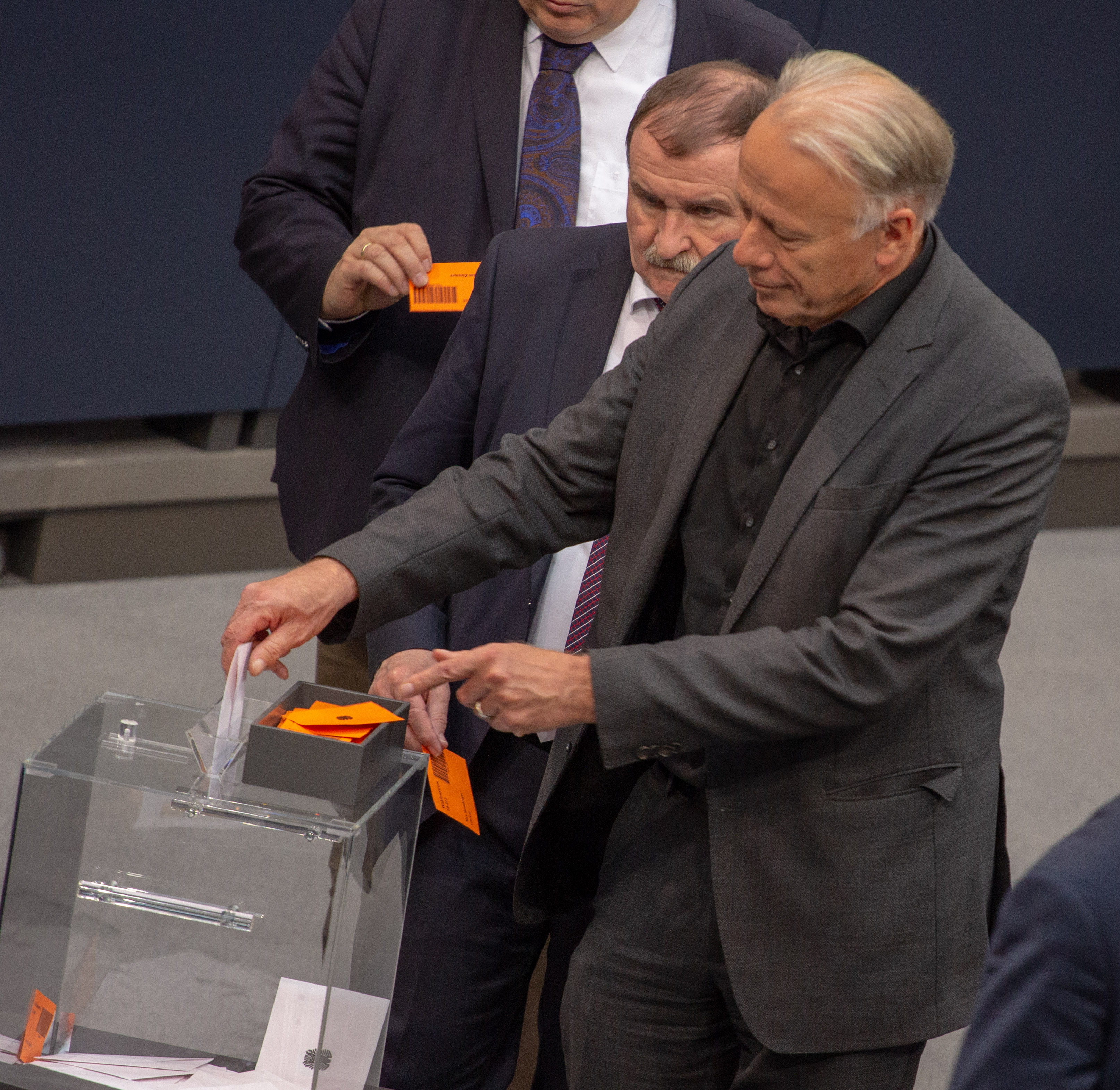 Jürgen Trittin, Mitglied des Deutschen Bundestages, während einer Plenarsitzung am 11. April 2019 in Berlin.